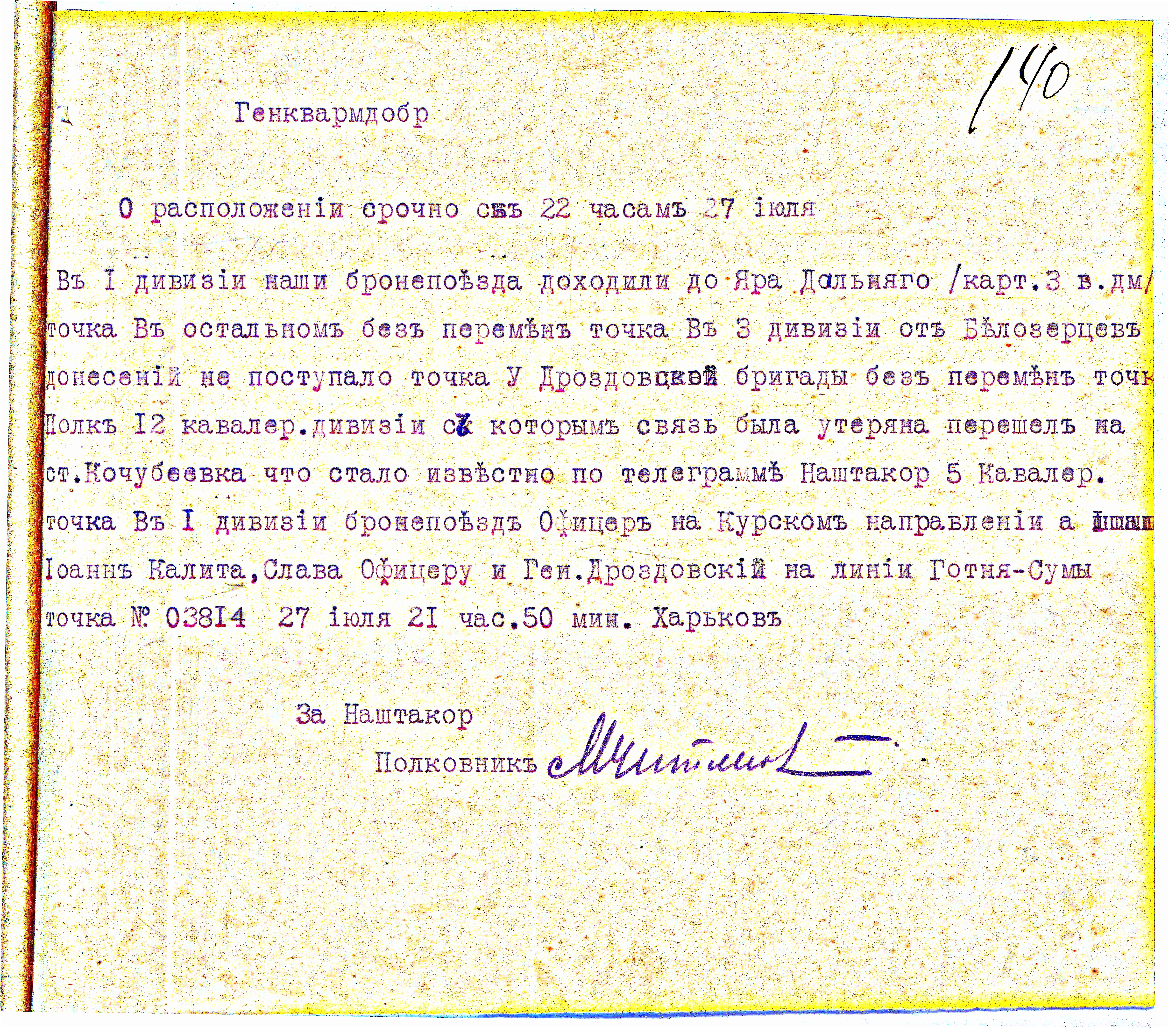 Телеграмма с указанием дислокации бронепоездов Добровольческой армии к 22.00 27 июля 1919 г.